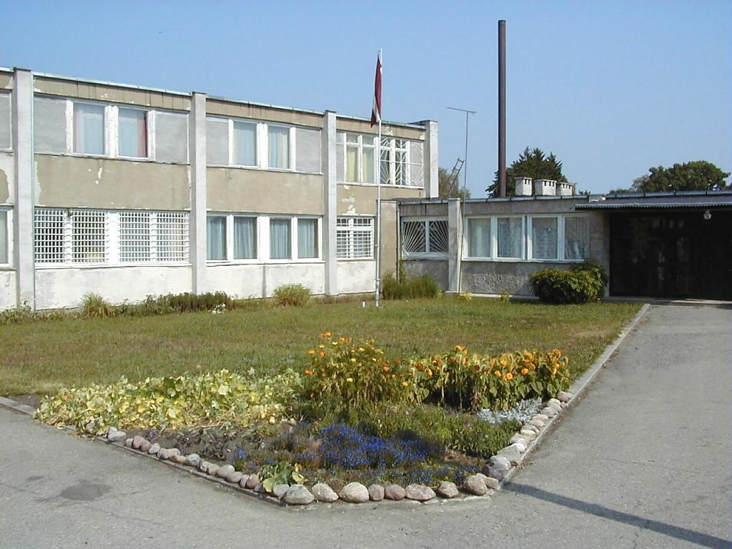 Virgas pagastnams Paplakā 2002-08-25